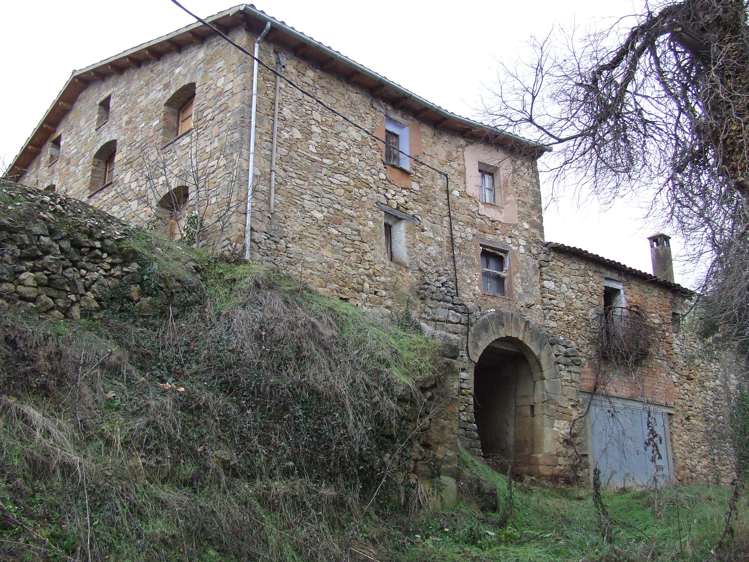 Portal de Merea (Sant Salvador de Toló, Gavet de la Conca, Pallars Jussà)